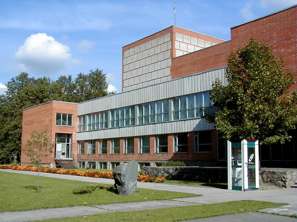 Slampes kultūras pils 2000-09-02